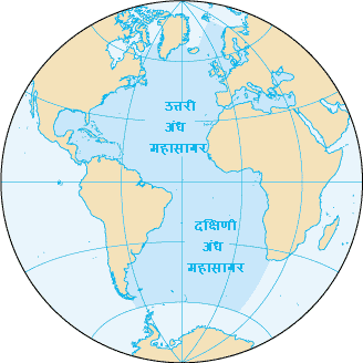 North and South hi:Atlantic Ocean